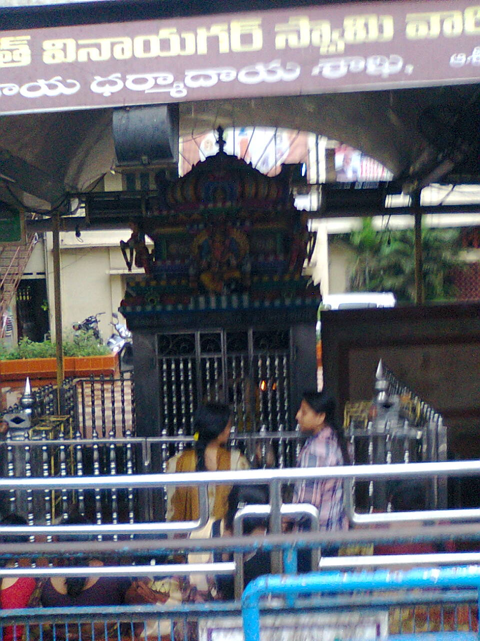 సంపత్ వినాయగర్ ఆలయం